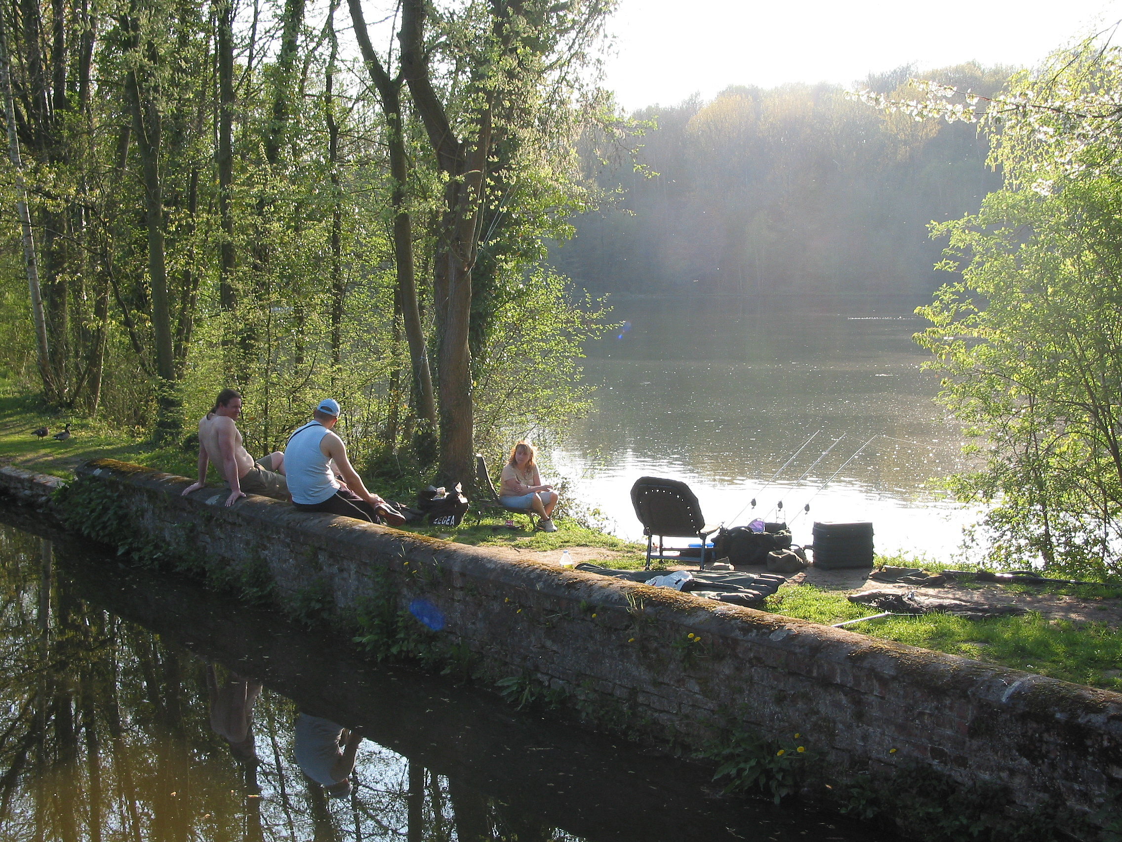 Saint-Denis, le bief du moulin de l'abbaye et les étangs.